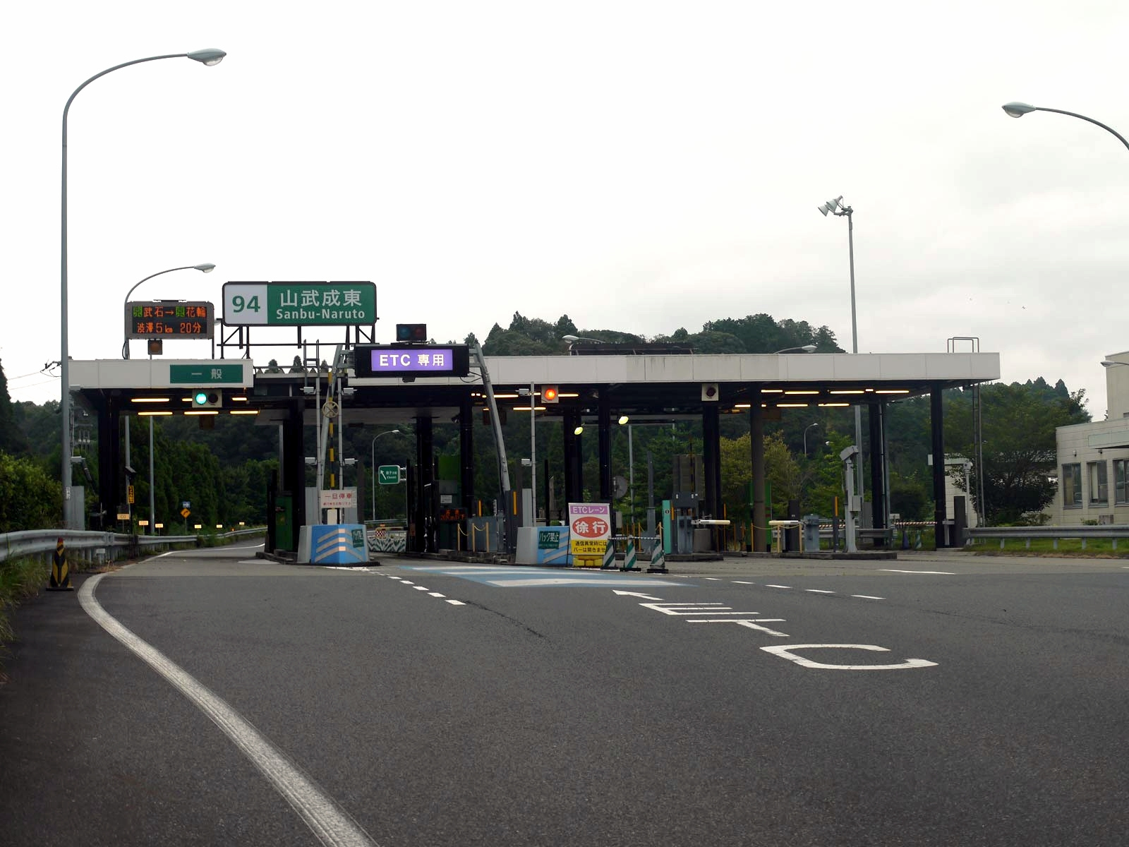 圏央山武成東IC